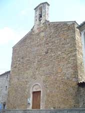 Eglise du Mas dieu